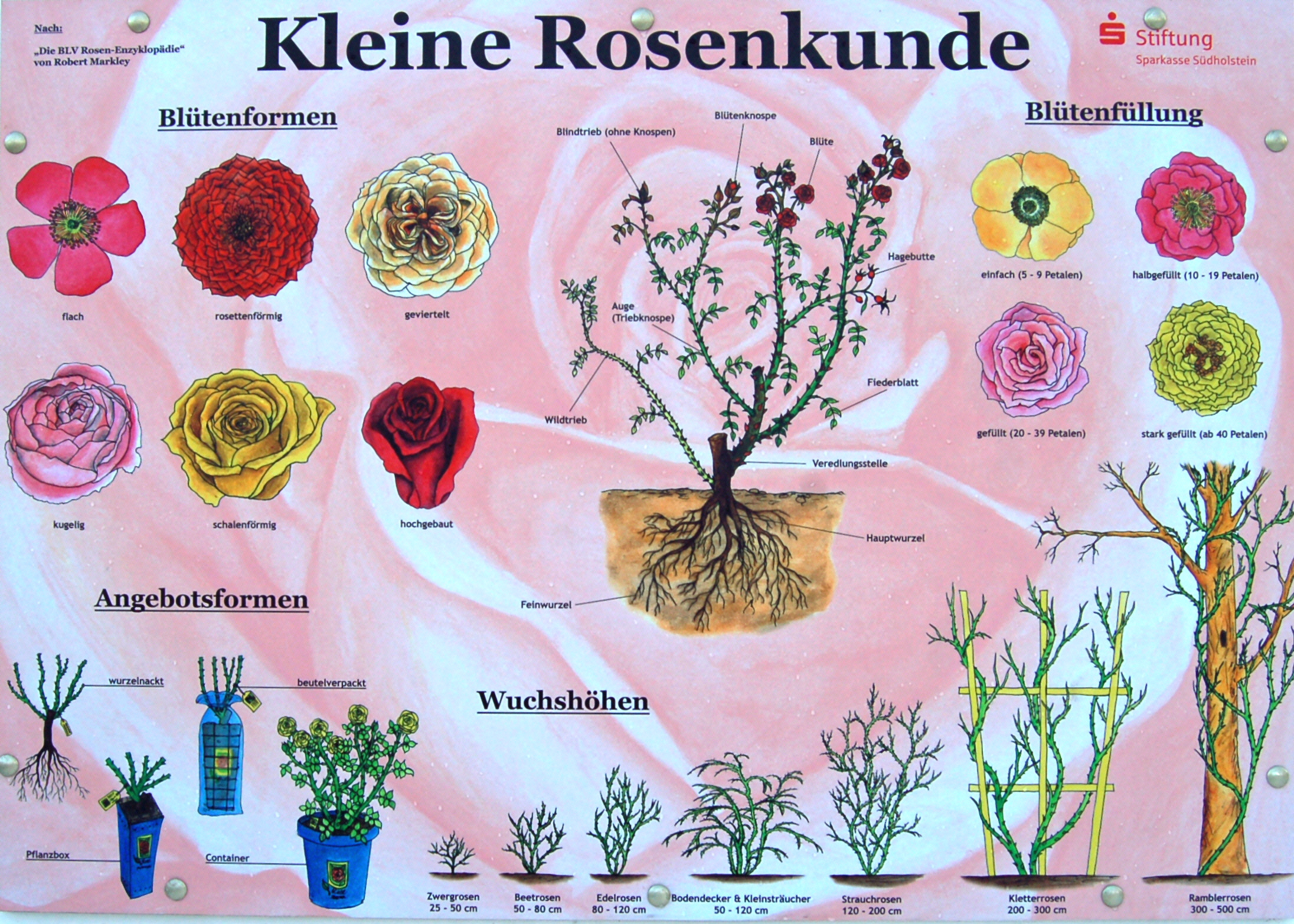 Infoschild Kleine Rosenkunde im Rosarium Uetersen